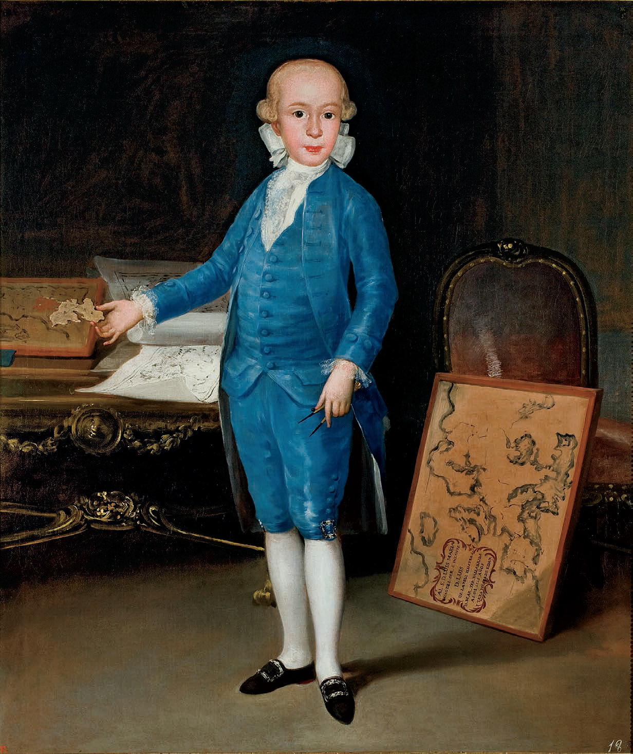 Retrato del Luis María de Borbón y Vallabriga (1777-1823), que fue hijo del infante Luis de Borbón y Farnesio y nieto del rey Felipe V de España, llegando a ser además cardenal de la Iglesia Católica, arzobispo de Toledo y de Sevilla y regente de España.